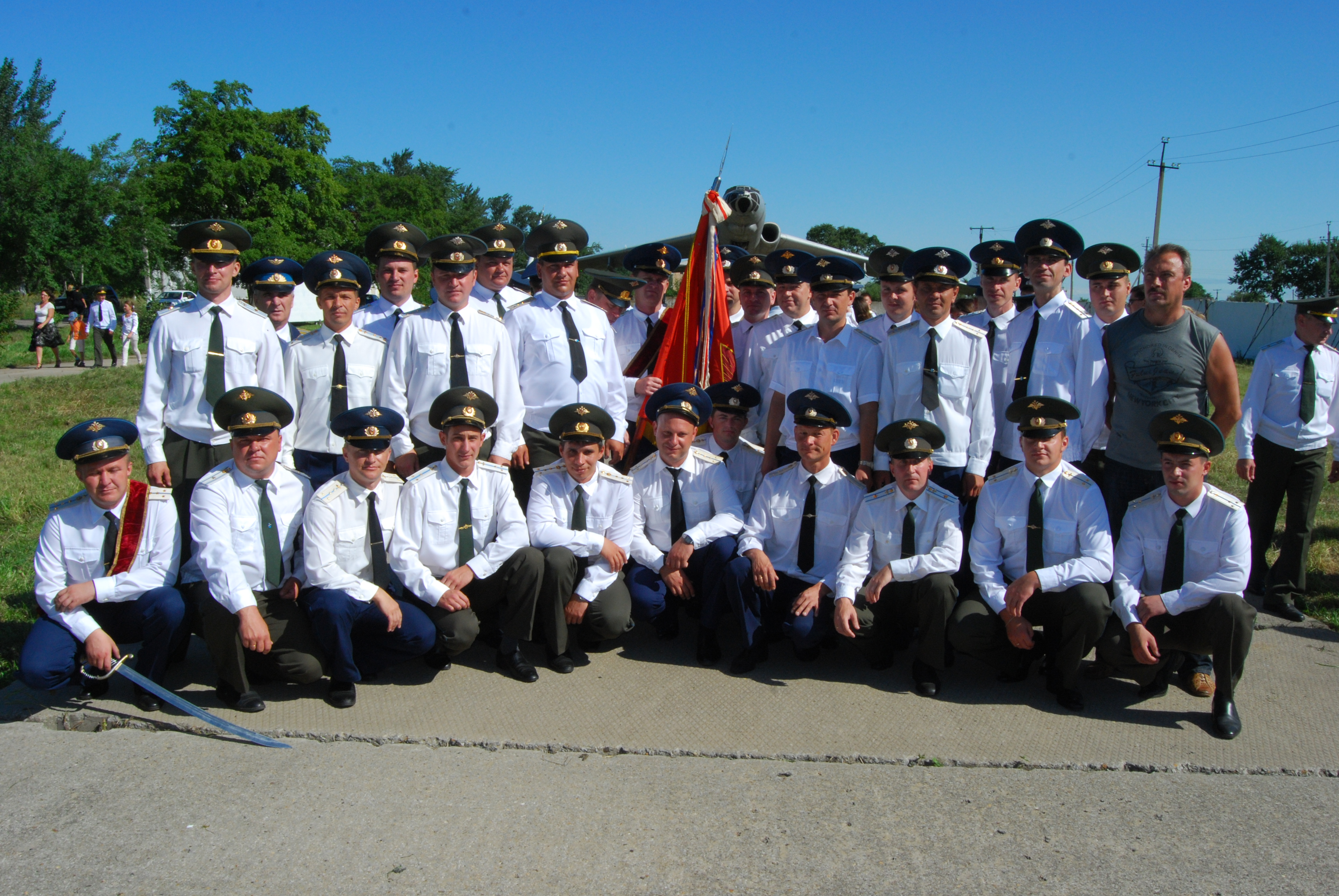 Военные Воздвиженки